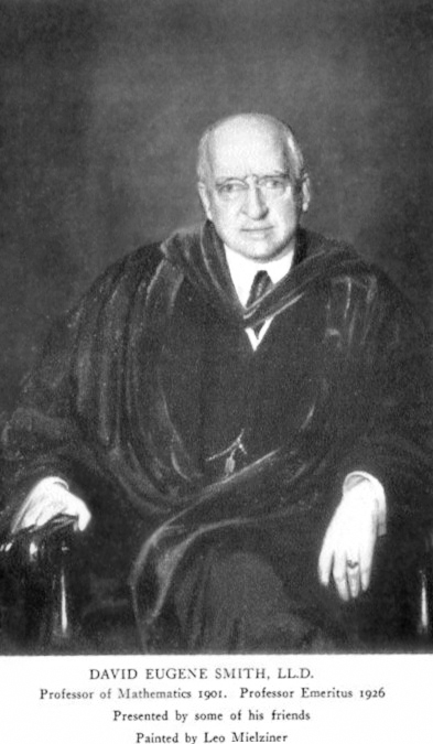 Retrat del Matemàtic estatunidenc David Eugene Smith (1860-1944) pintat per Leo Mielziner (1869-1935)